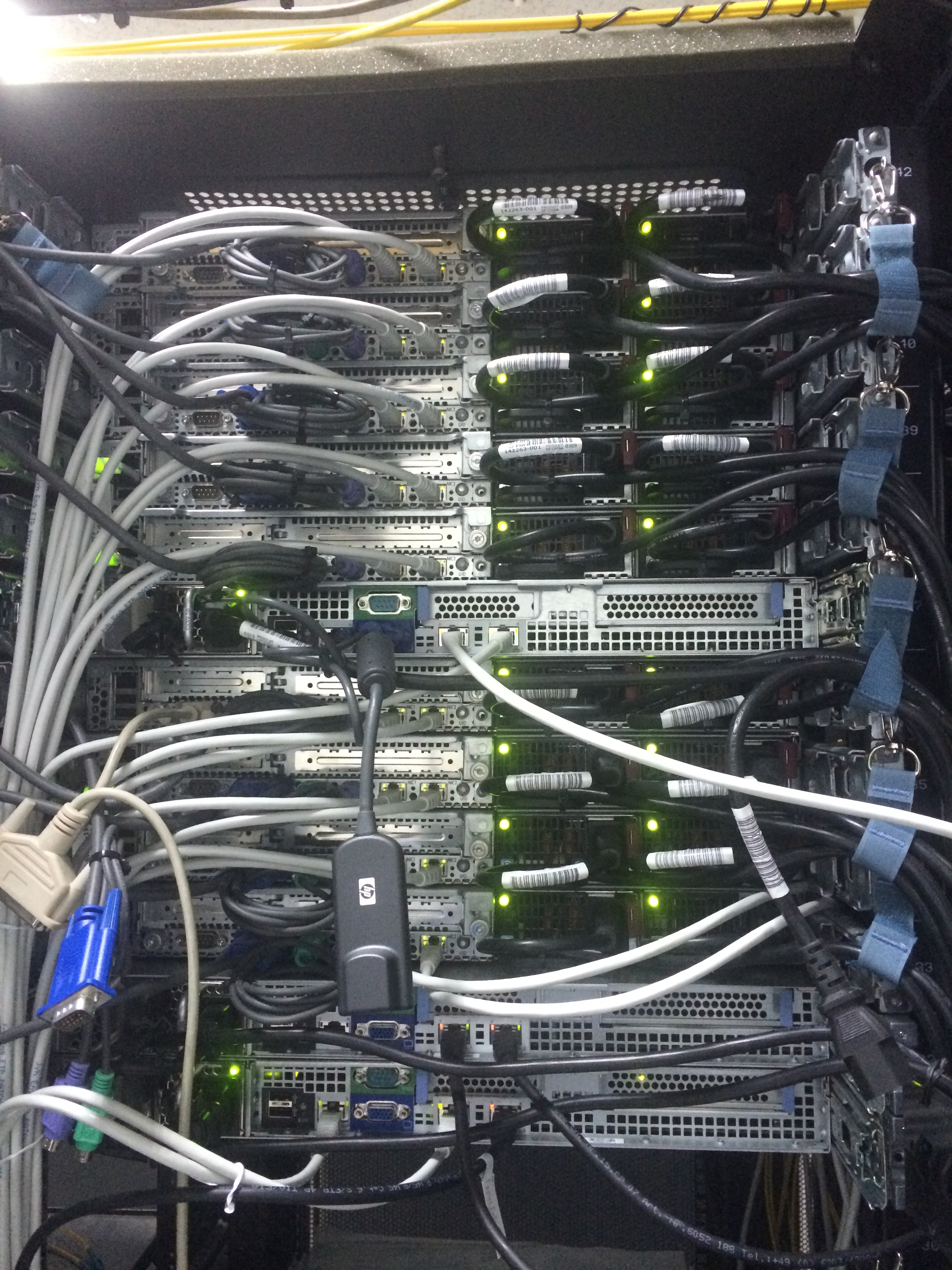 Back view of servers mounted in a rack cabinet.